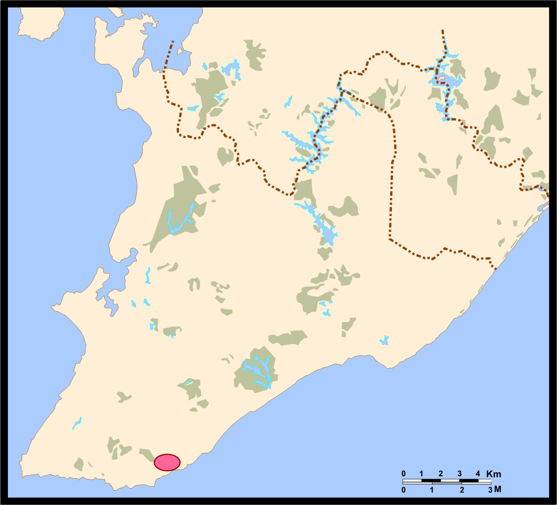 Mapa de Salvador (Bahia, Brazil) - Localização do bairro da Pituba.